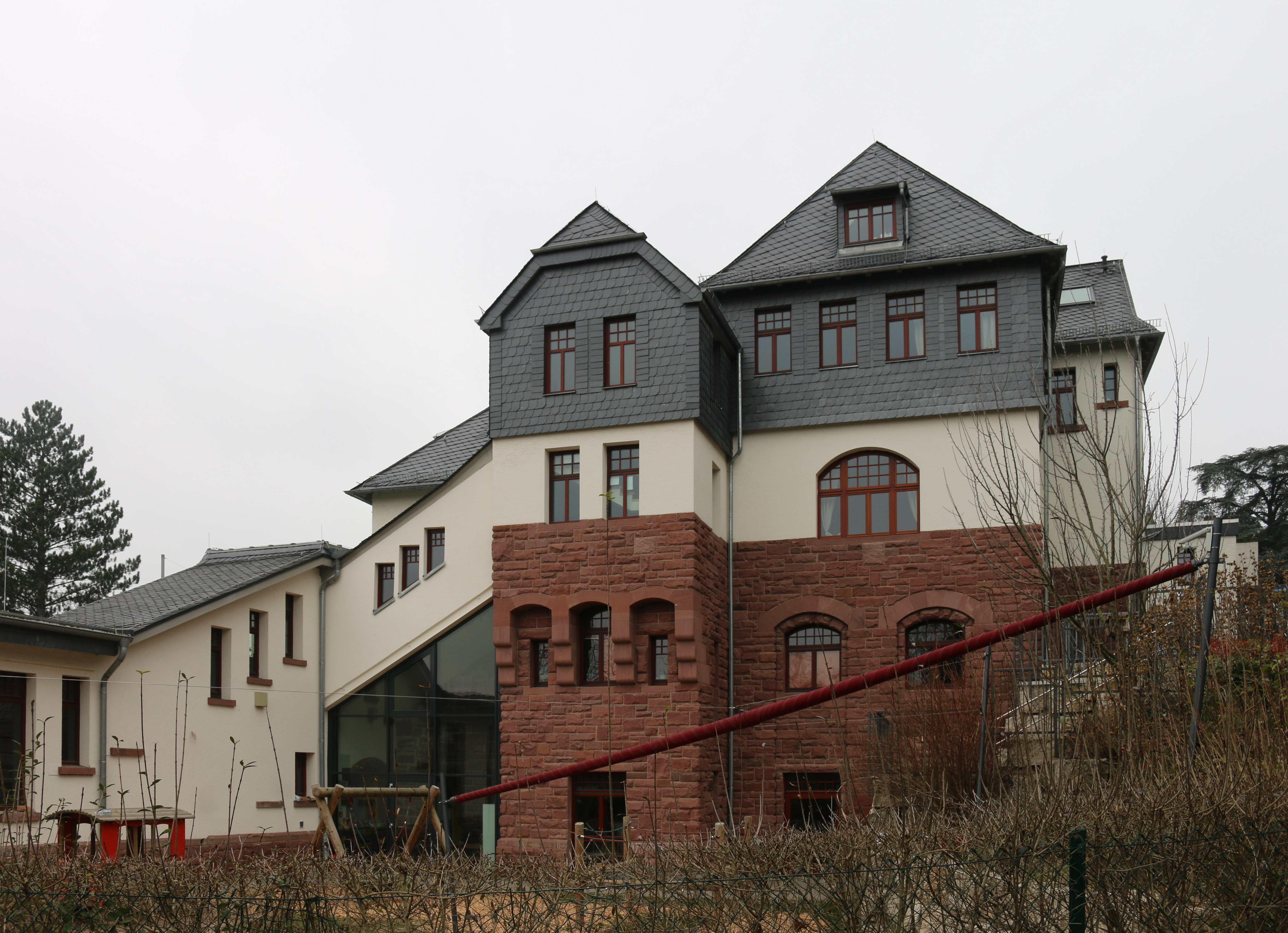 Wiesbaden: Ehemaliger Bahnhof der Aartalbahn an der Biebricher Allee, eröffnet 1907, heute Kindergarten